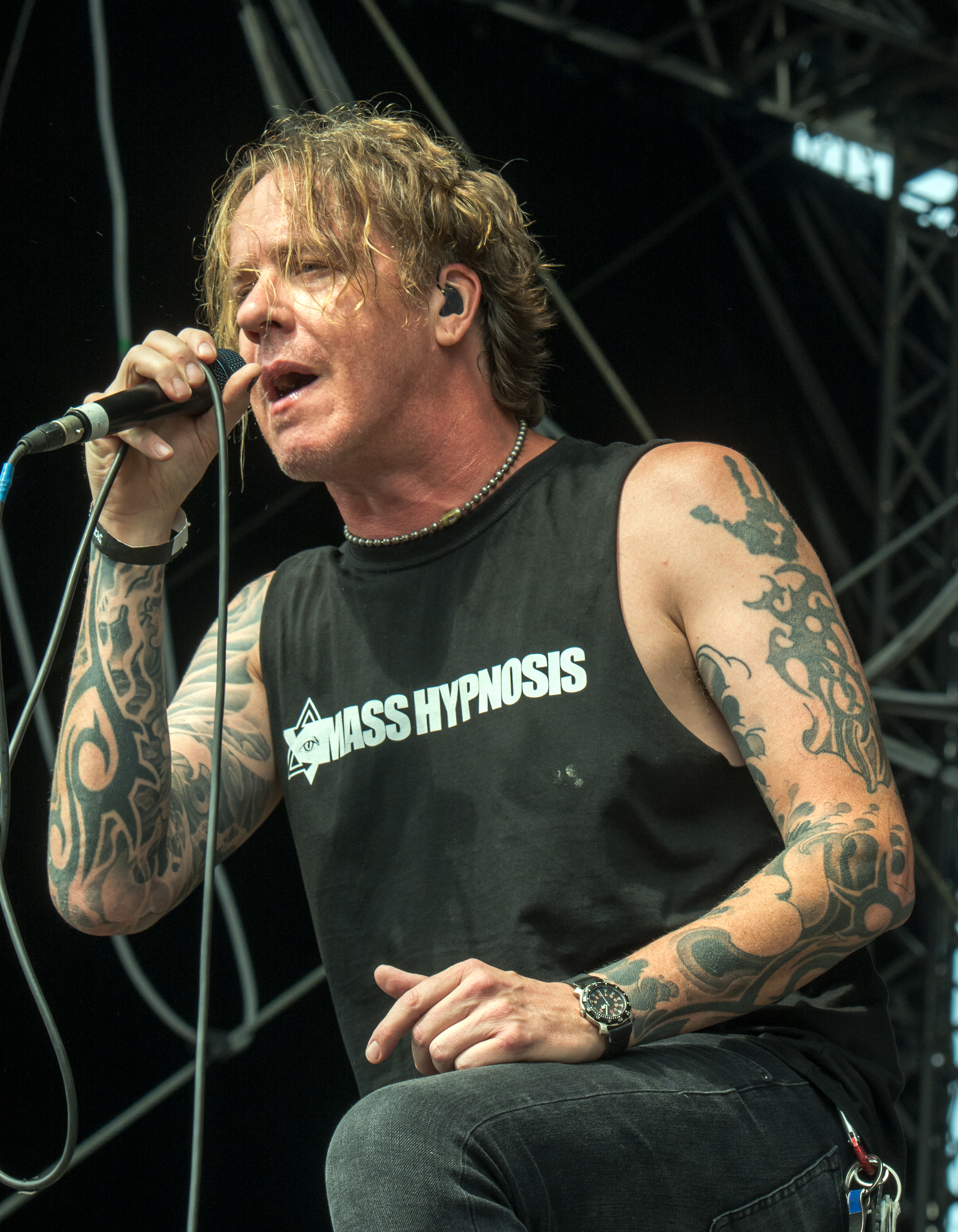 Fear Factory auf dem Elbriot 2016